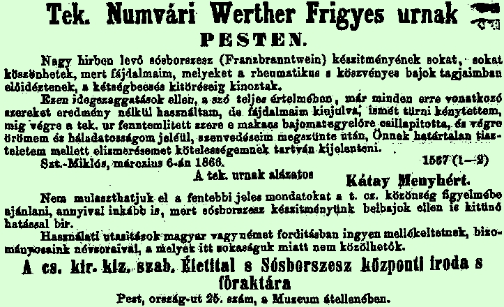 Hirdetés a Vasárnapi Ujságban